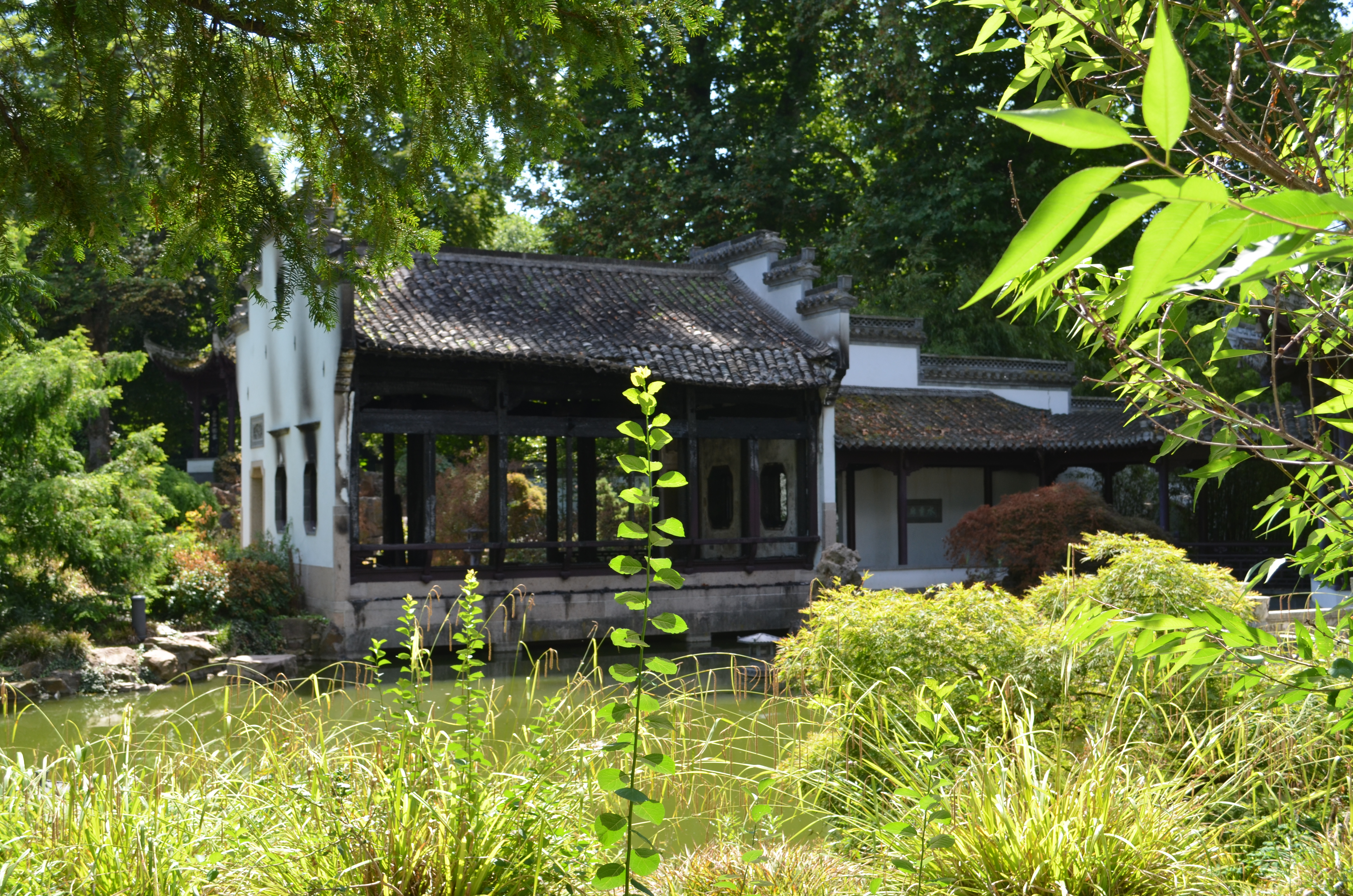 Frankfurt, Wasserpavillon nach Brandanschlag